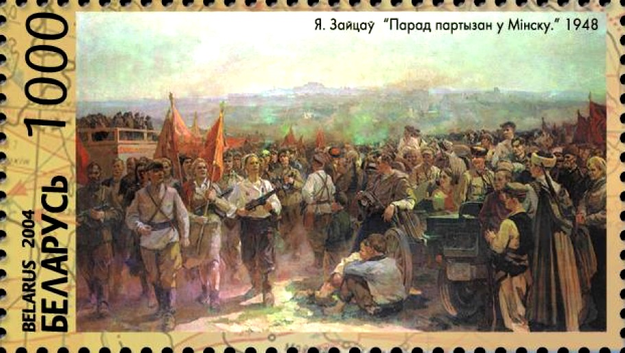 4 мая 2004 года в почтовое обращение ввелась почтовая марка, посвященная 60-летию освобождения Беларуси от немецко-фашистских захватчиков. Евгений Зайцев. Живопись. «Парад партизан в Минске». 1948